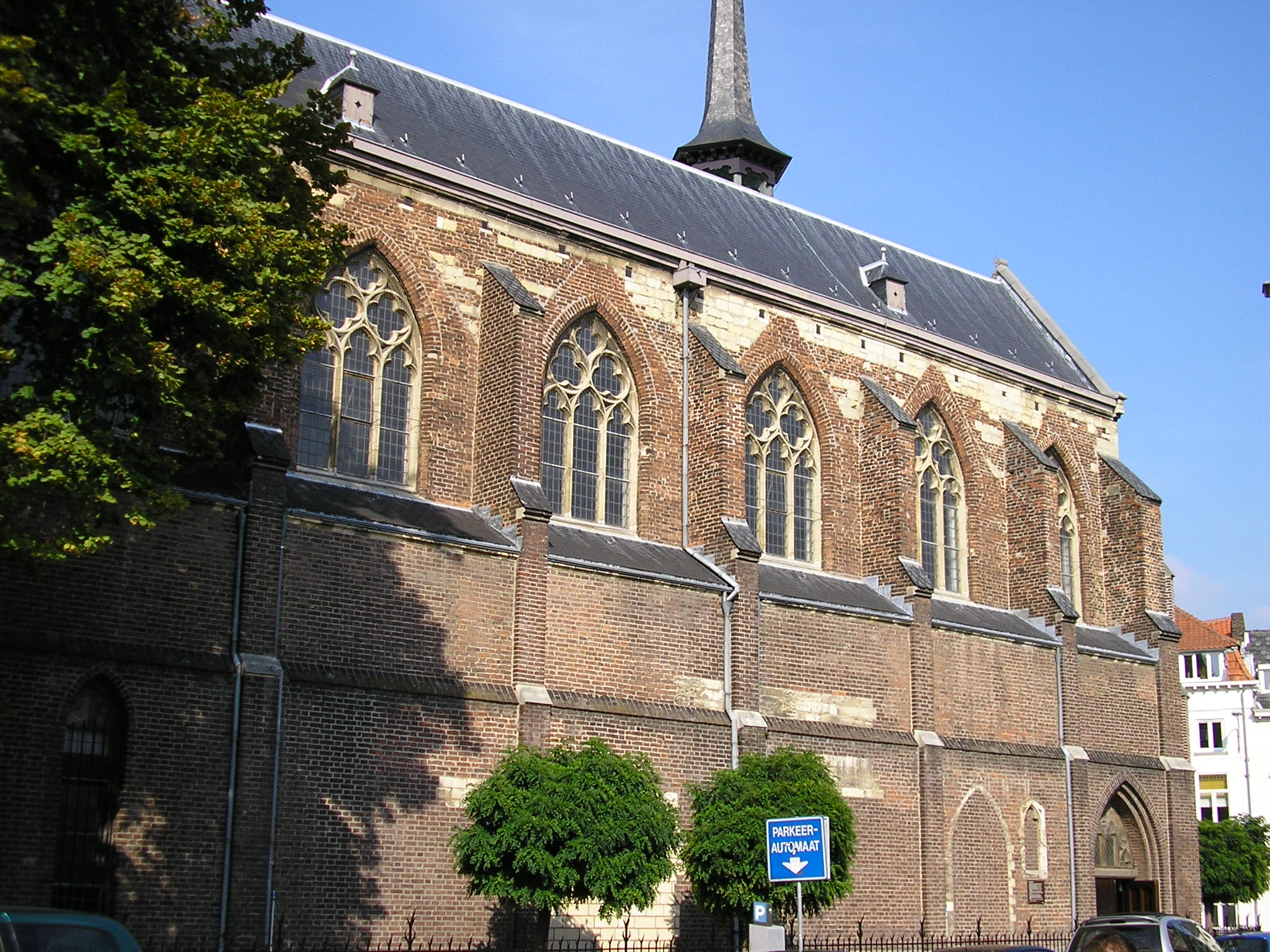 Nederland Hervormde Minderbroederskerk